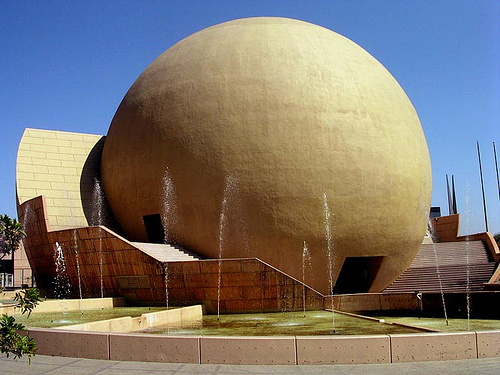 Centro cultural Tijuana, con fuente.